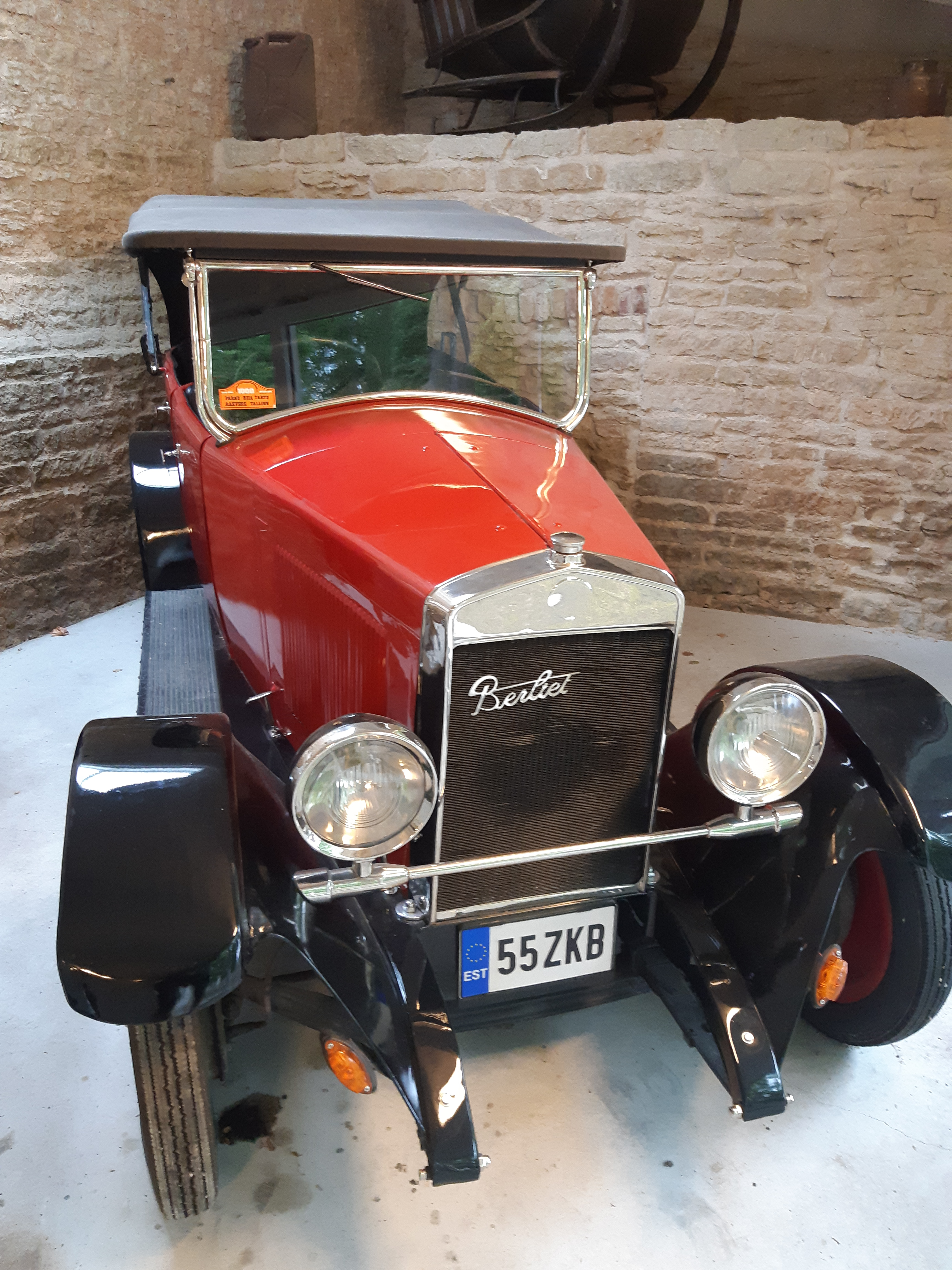 Vihula mõisas asuv vana sõiduauto Bertilet